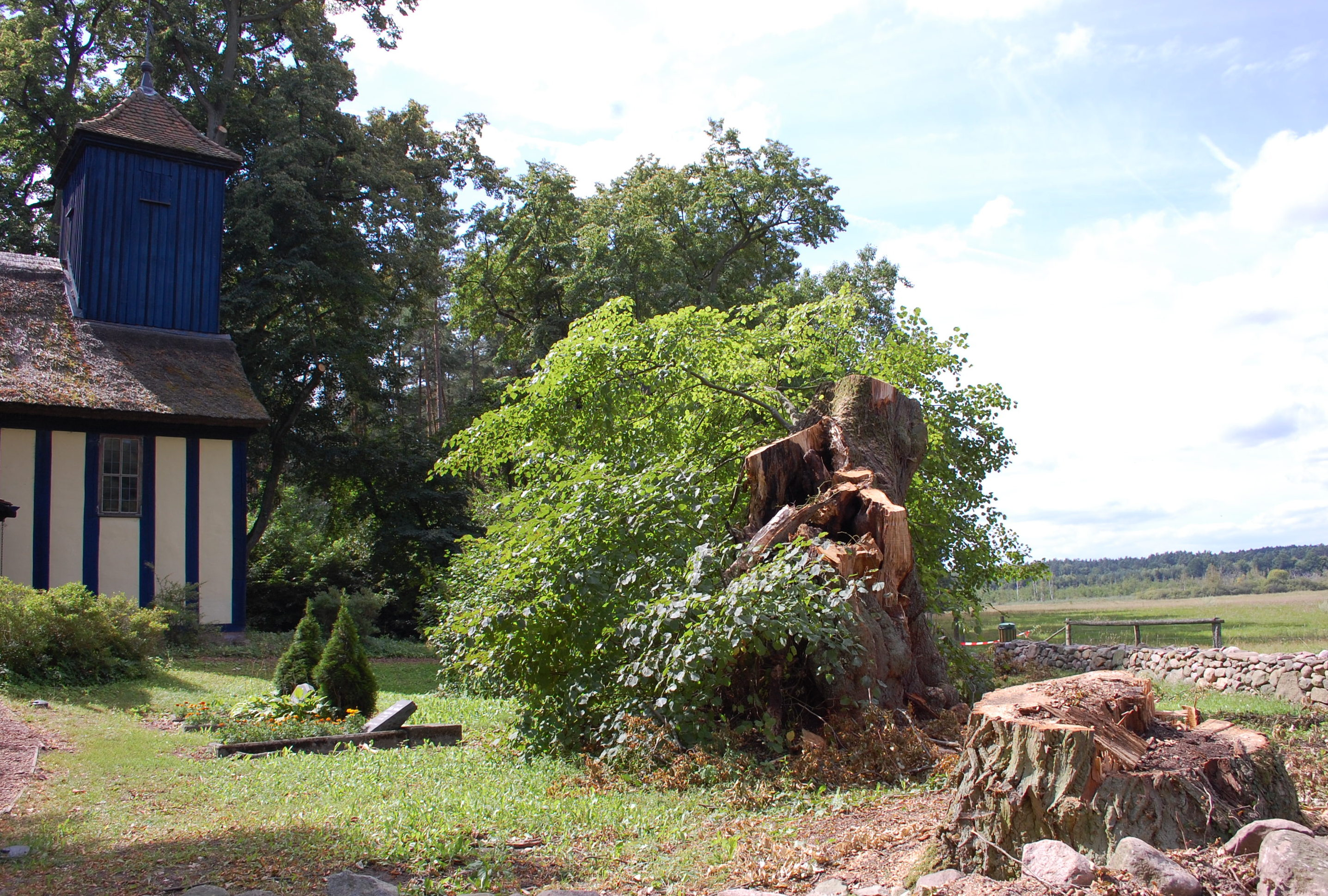 Sturmschäden im Umfeld des Kirchleins im Grünen 2012